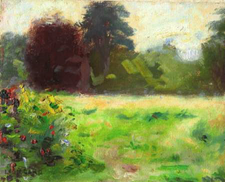 Photo d'un tableau ("Le Hêtre rouge") dont je suis l'ayant-droit.